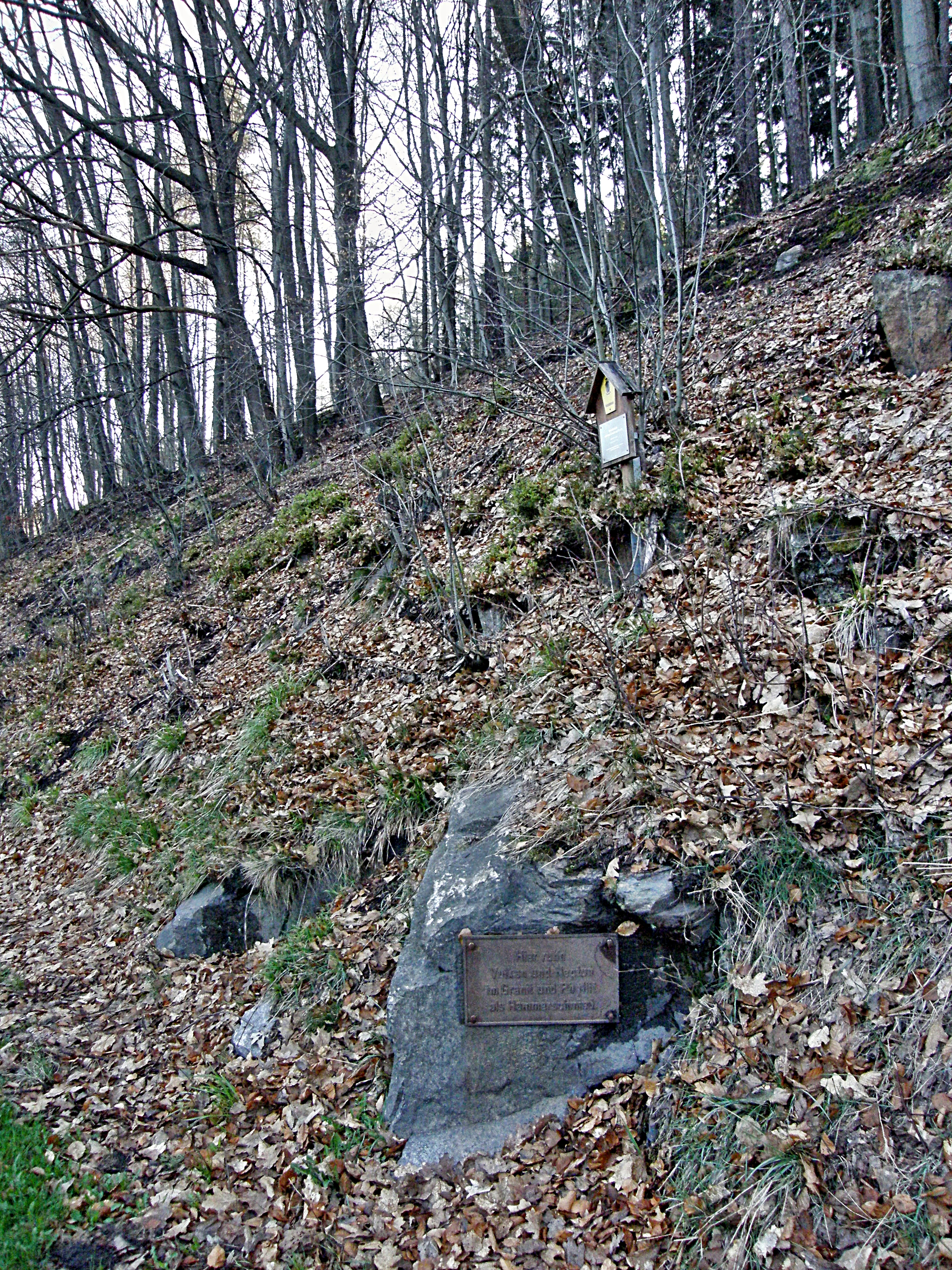 Aue, „Der Hammerschmied“